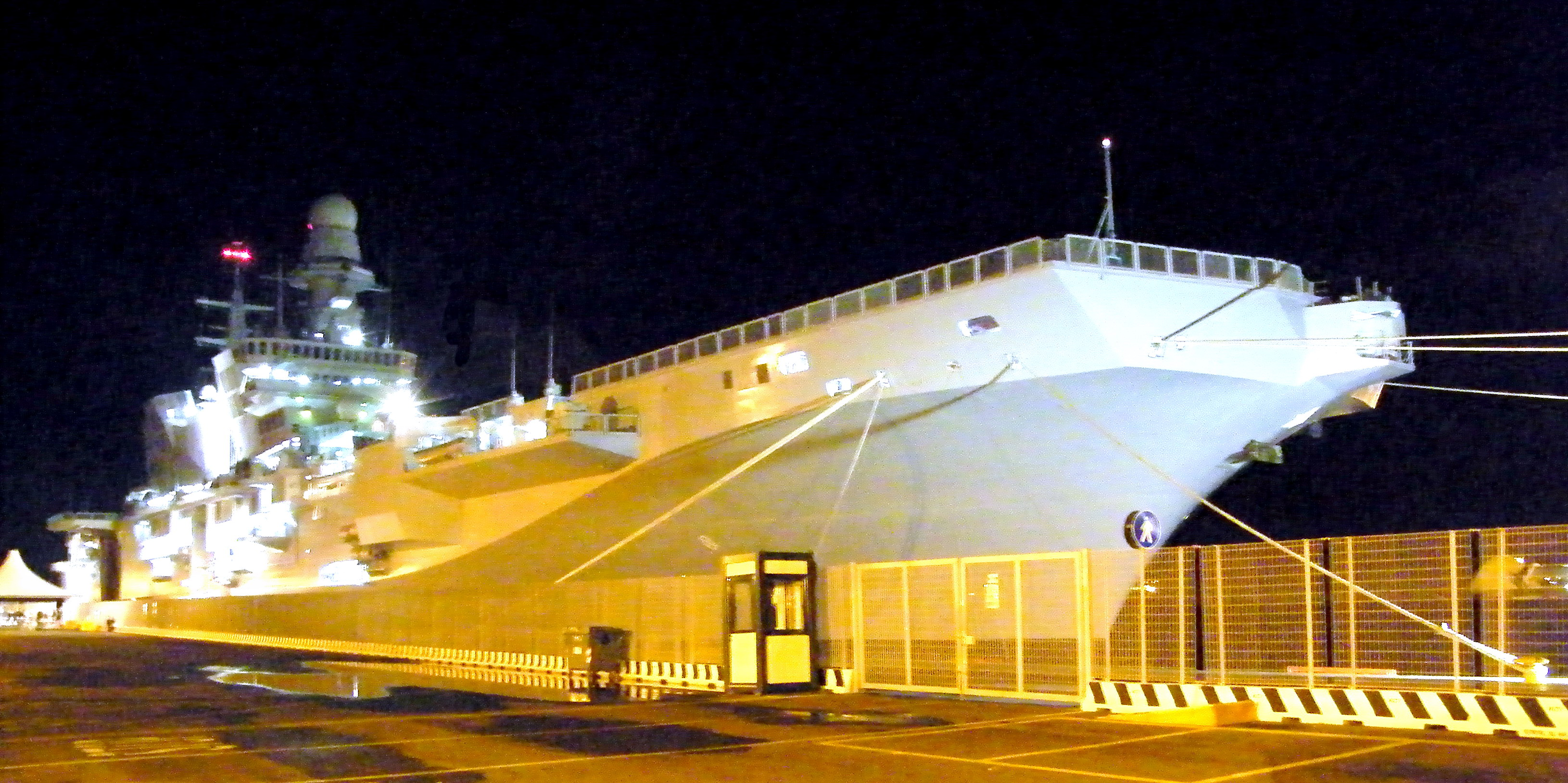 Immagine notturna della portaerei Cavour ormeggiata a Civitavecchia